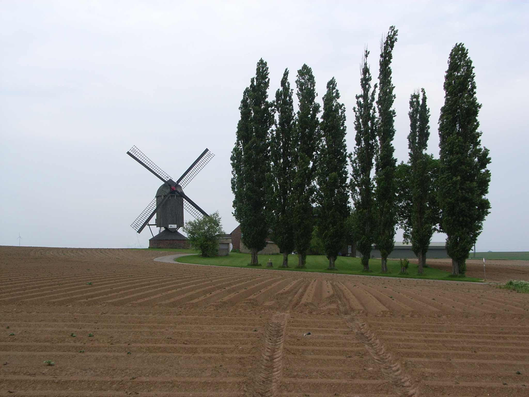 Düppelsmuehle, Titz